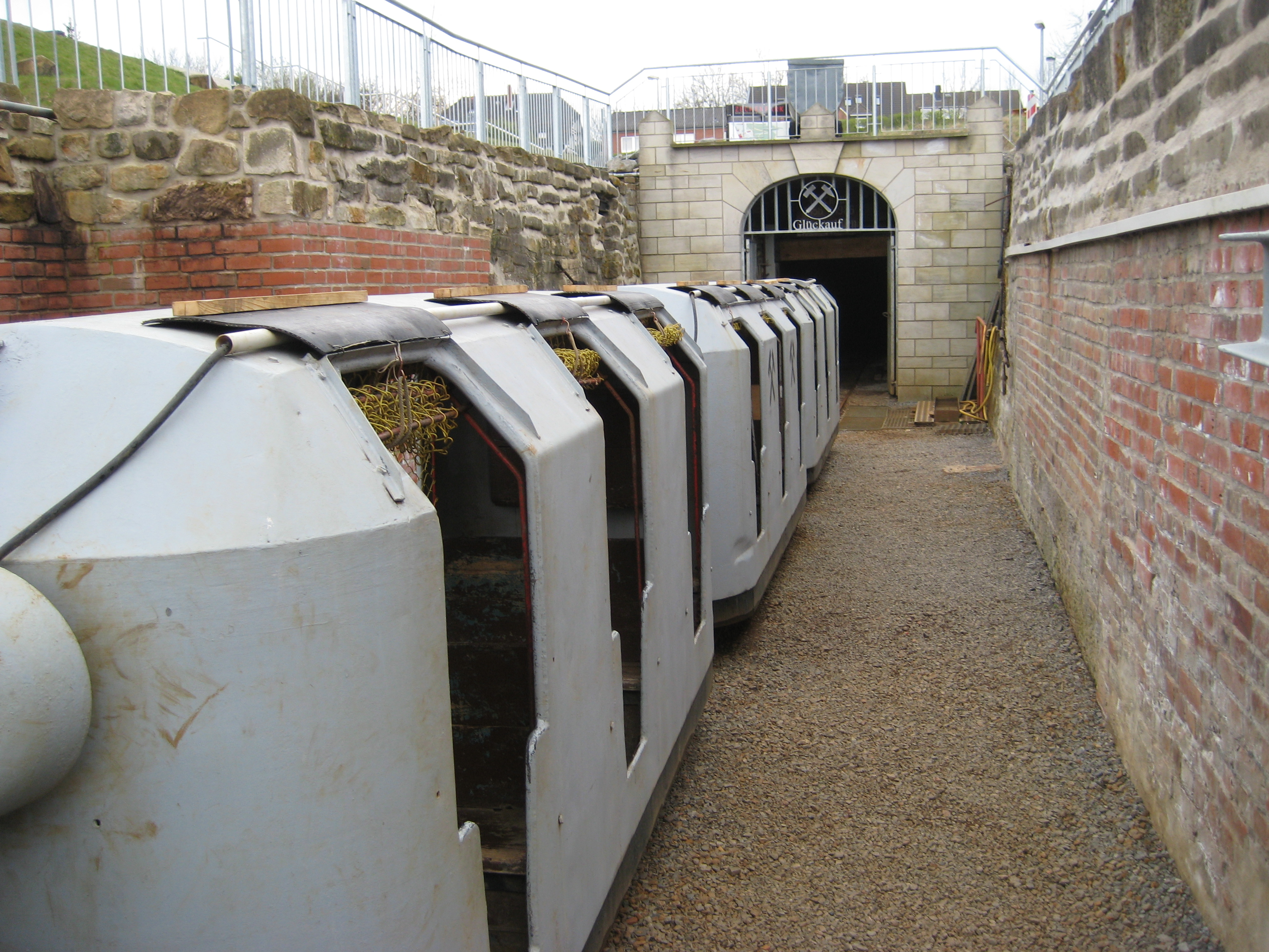 Besucherbergwerk Klosterstollen in Barsinghausen Kleinbahn